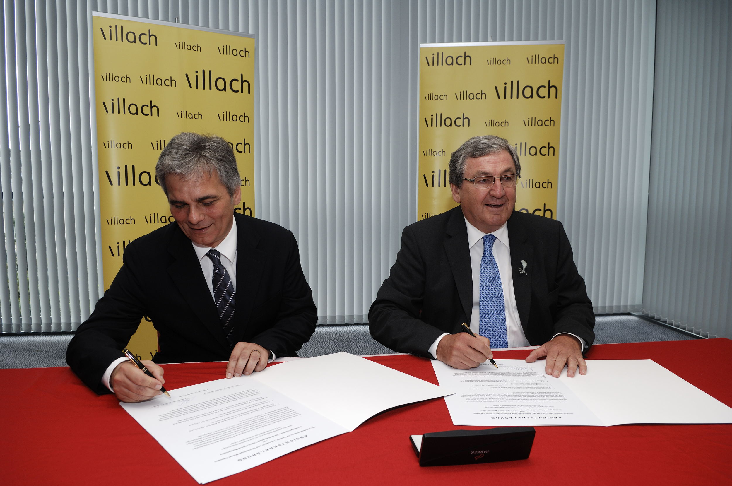 Werner Faymann, SPÖ- Spitzenkandidat für die Nationalratswahl 2008, beim Landesparteitag der SP-Kärnten im Congress Center Villach. 23.08.2008, © Thomas Jantzen/SPÖ.